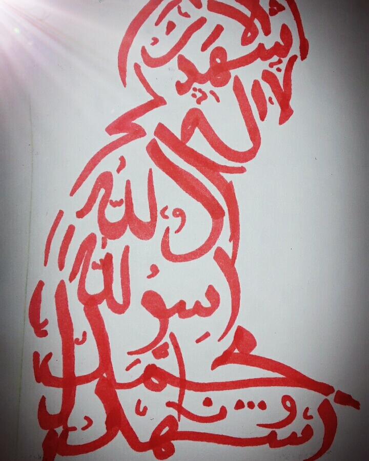 Shahadhath